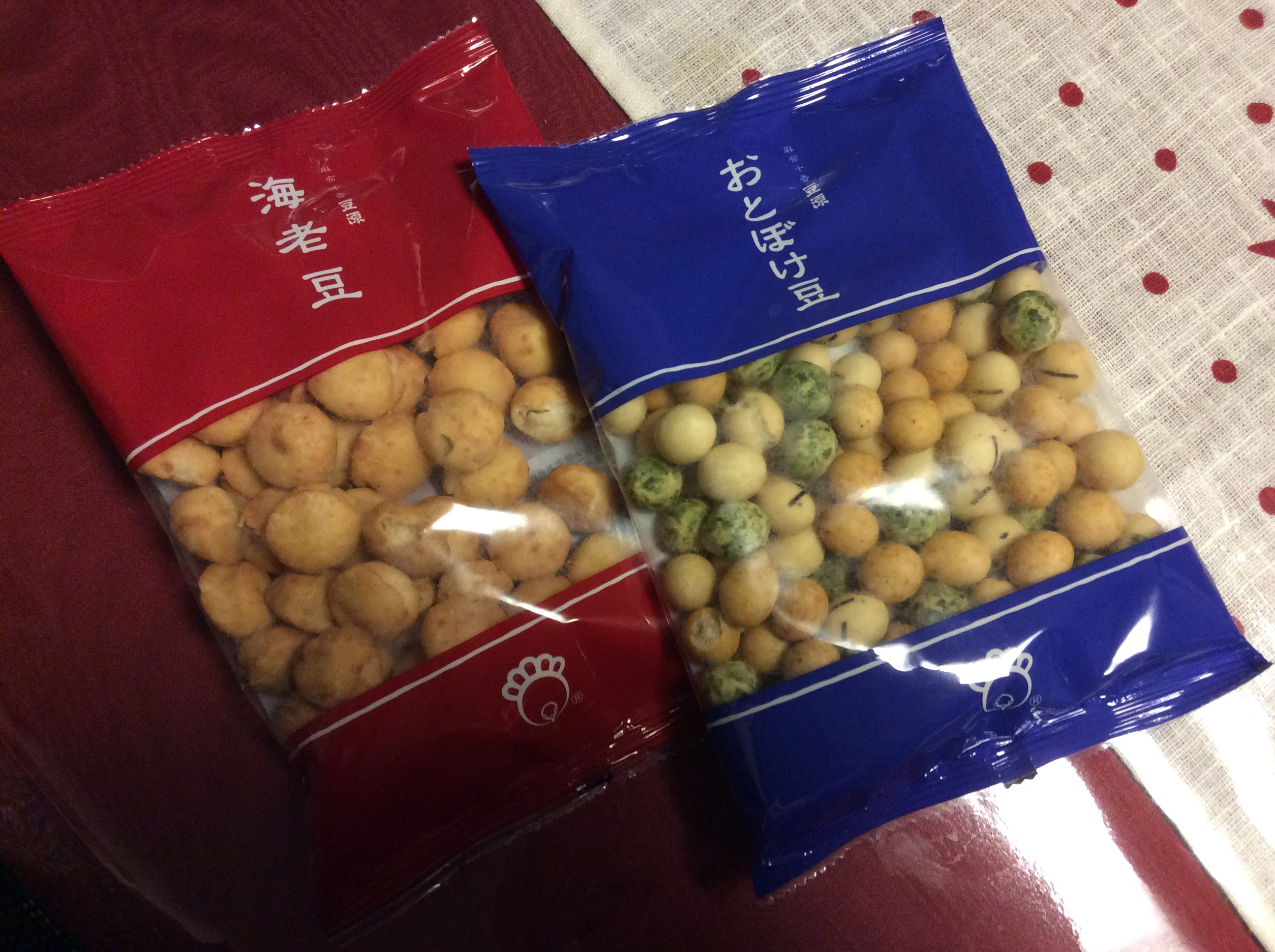 麻布十番 豆源